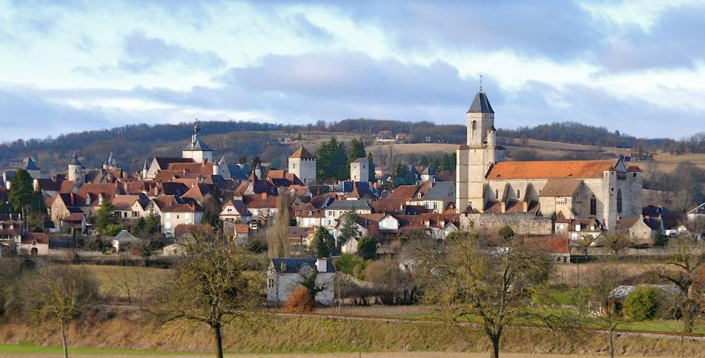 Vue générale de Martel dans le département français du Lot depuis le chemin de fer touristique.